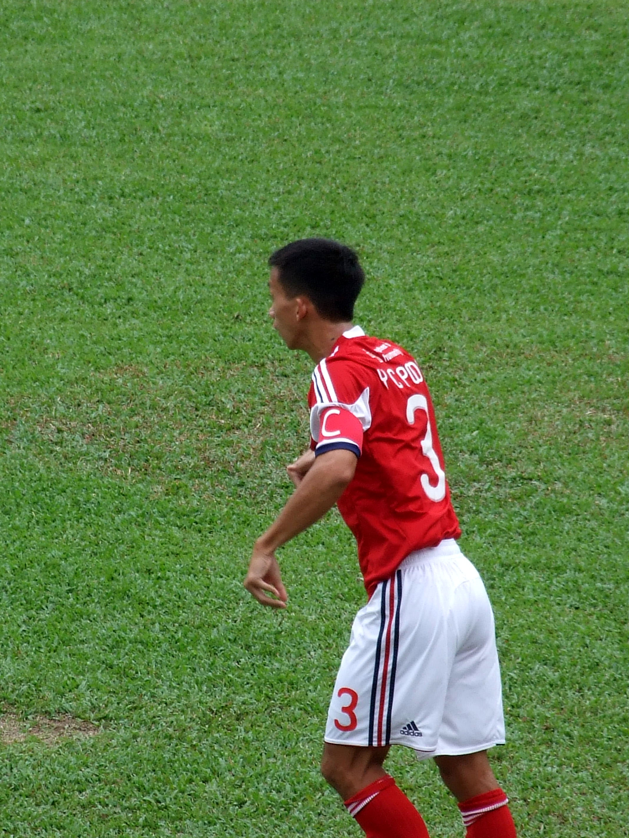 中文（香港）: 潘耀焯